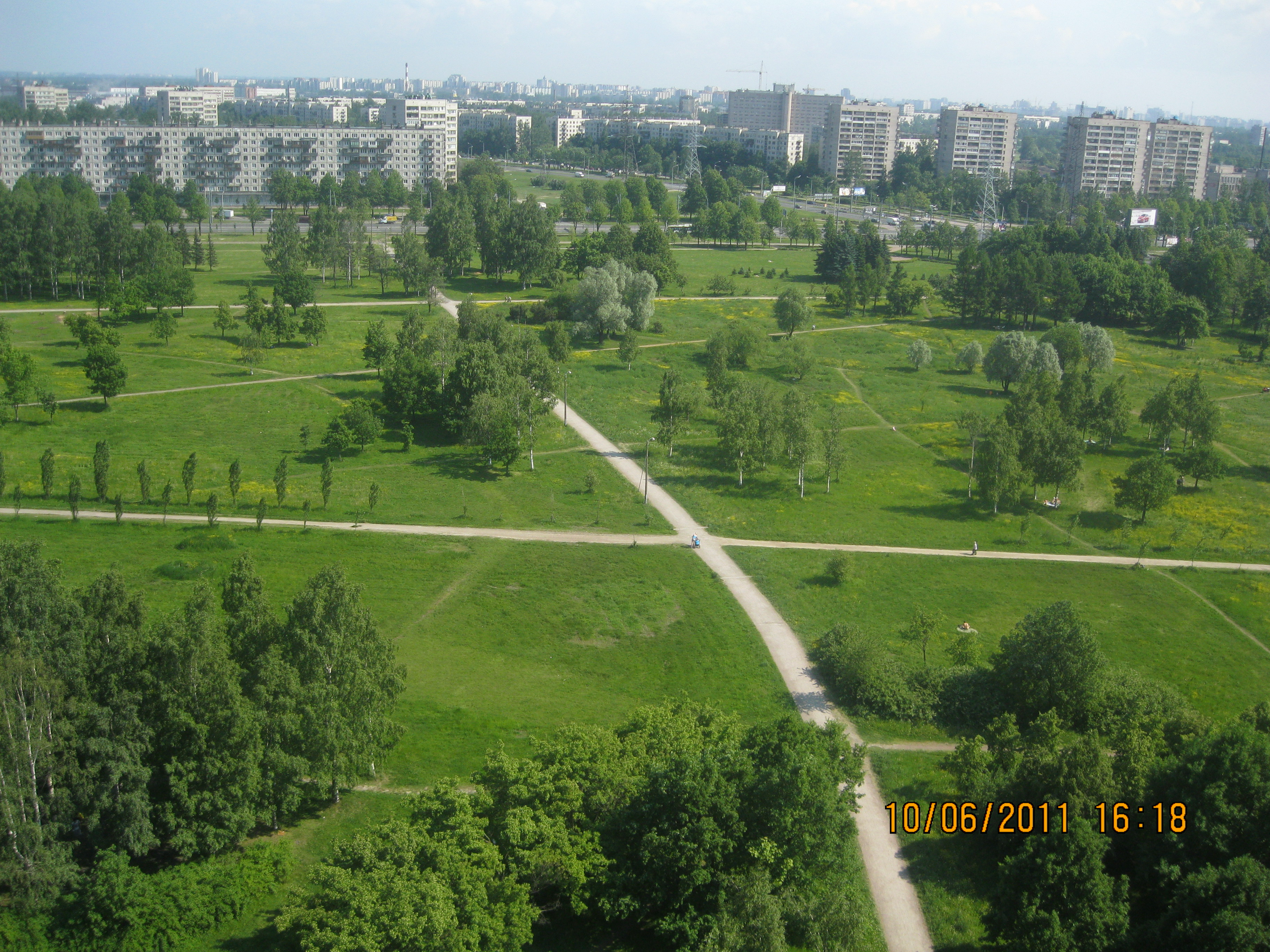 Парк имени Академика Сахарова с высоты